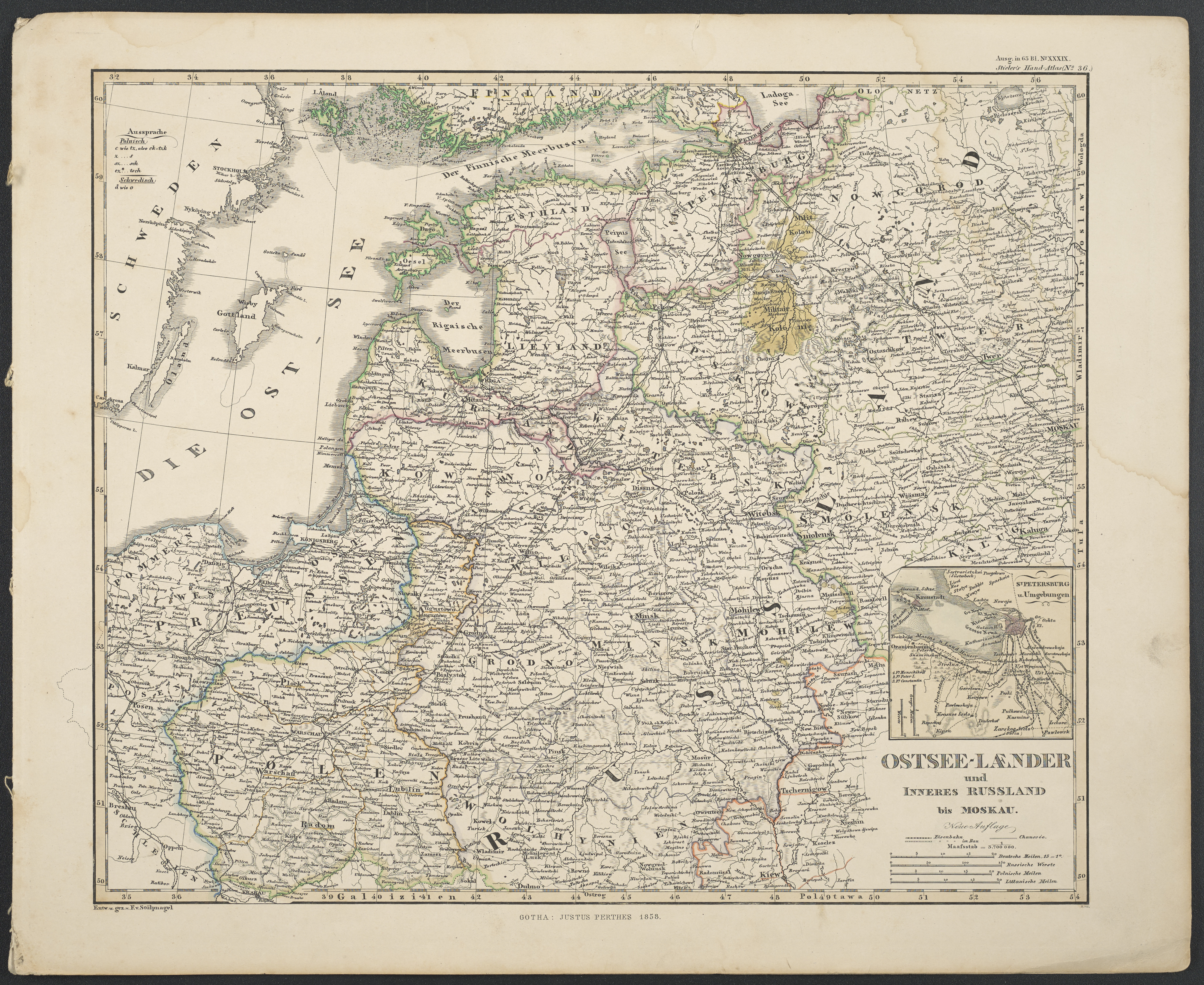 Koordinaten E 15°34'00"-E 38°03'00"/N 60°45'00"-N 50°05'00" ; Karte aus Stieler's "Hand-Altlas über alle Theile der Erde nach dem neusten Zustande und über das Weltgebäude" ; 36 (Ausgabe in Bl. No. XXXIX)